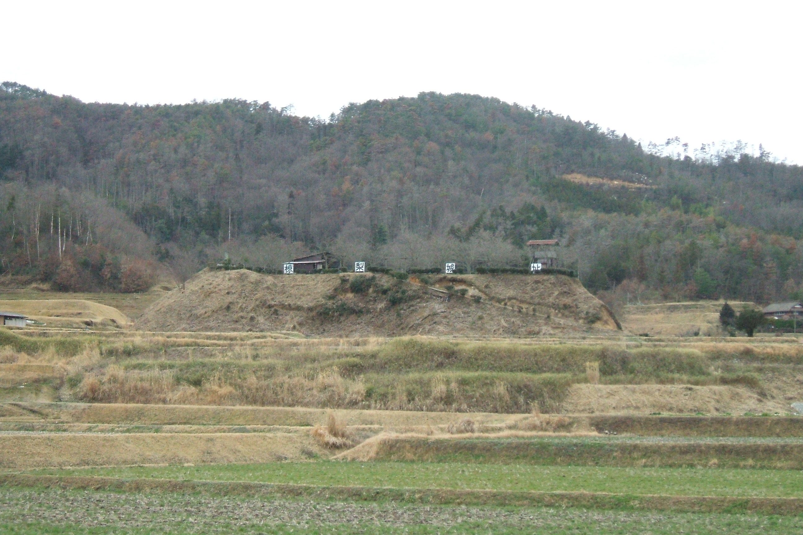 広島県三原市にある日本の戦国時代の椋梨城址。別名を堀城という。